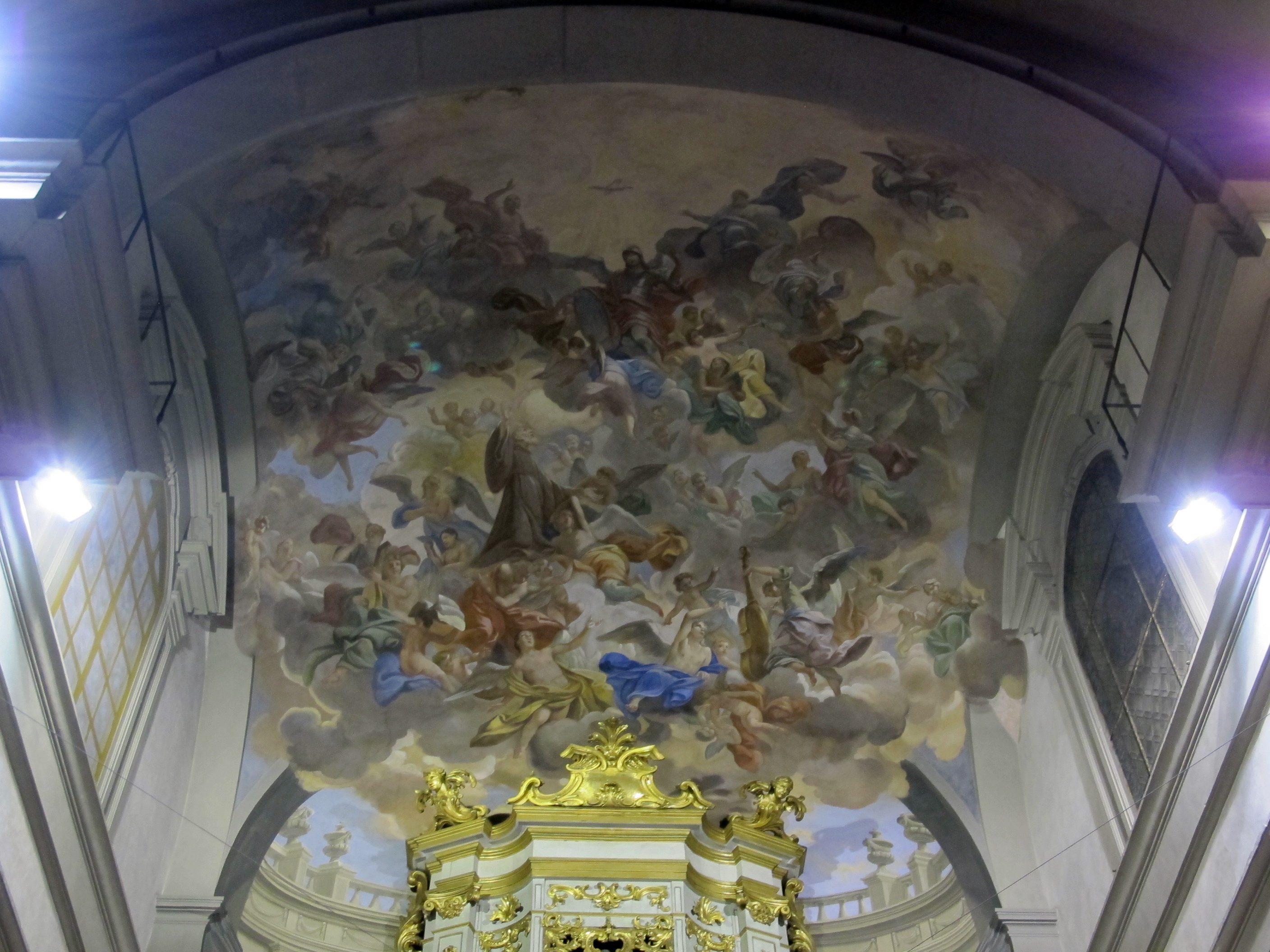 Chiesa di s. giuseppe, fi, affreschi di sigismondo betti e piero anderlini